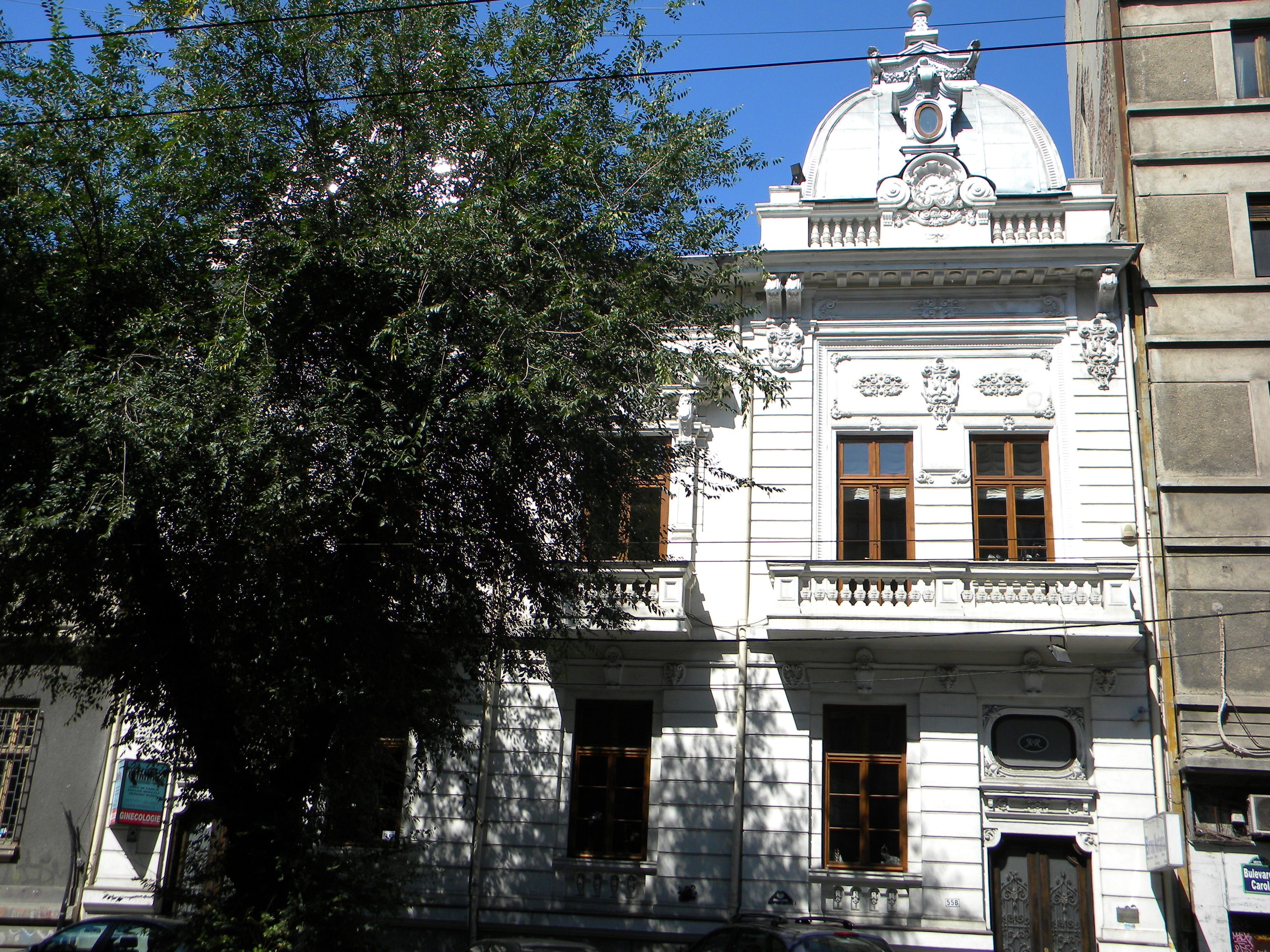 Imobil pe Bd. Carol I,nr. 55, Bucuresti sect. 2